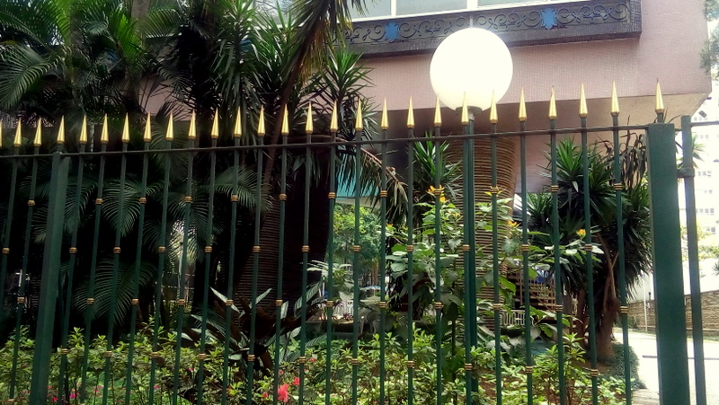 Detalhe arquitetônico da coluna de sustentação da parte direita do Edifício Bretagne, São Paulo (SP), Brasil